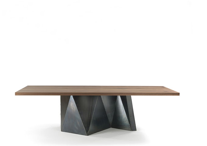 OOKI TABLE